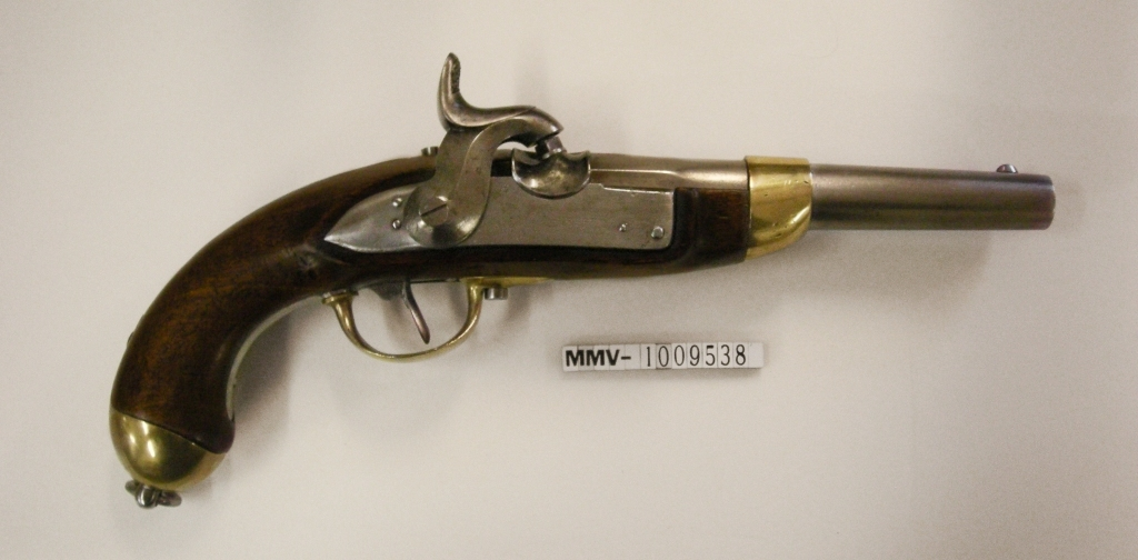 Perkussionspistole Ord. 1842 Kaliber 17,1 mm, franz. Fabrikat